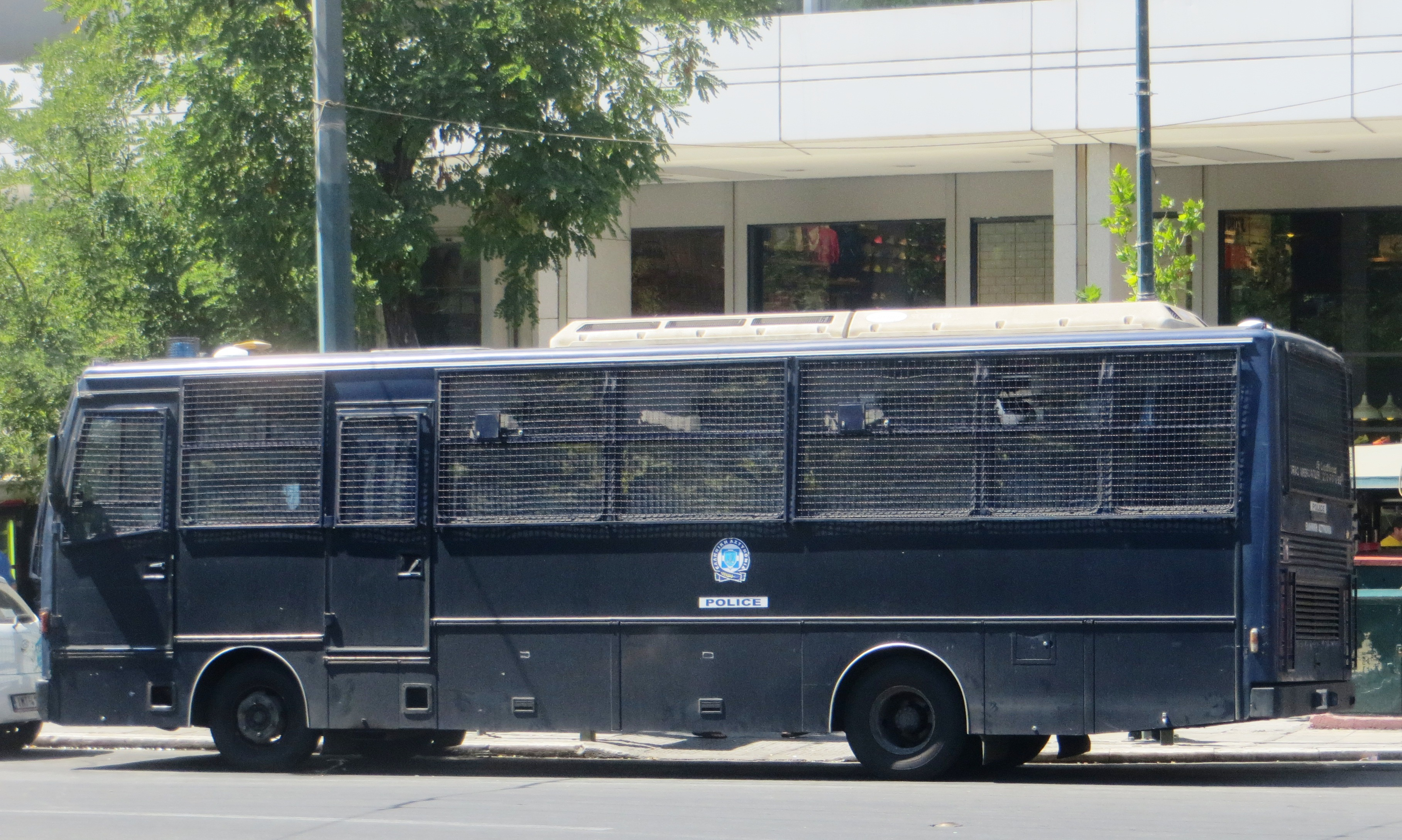 Griekse politieauto